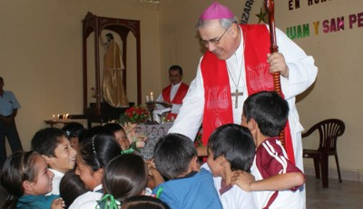 Obispo, Mons. Santiago junto a niños de una comunidad cristiana.